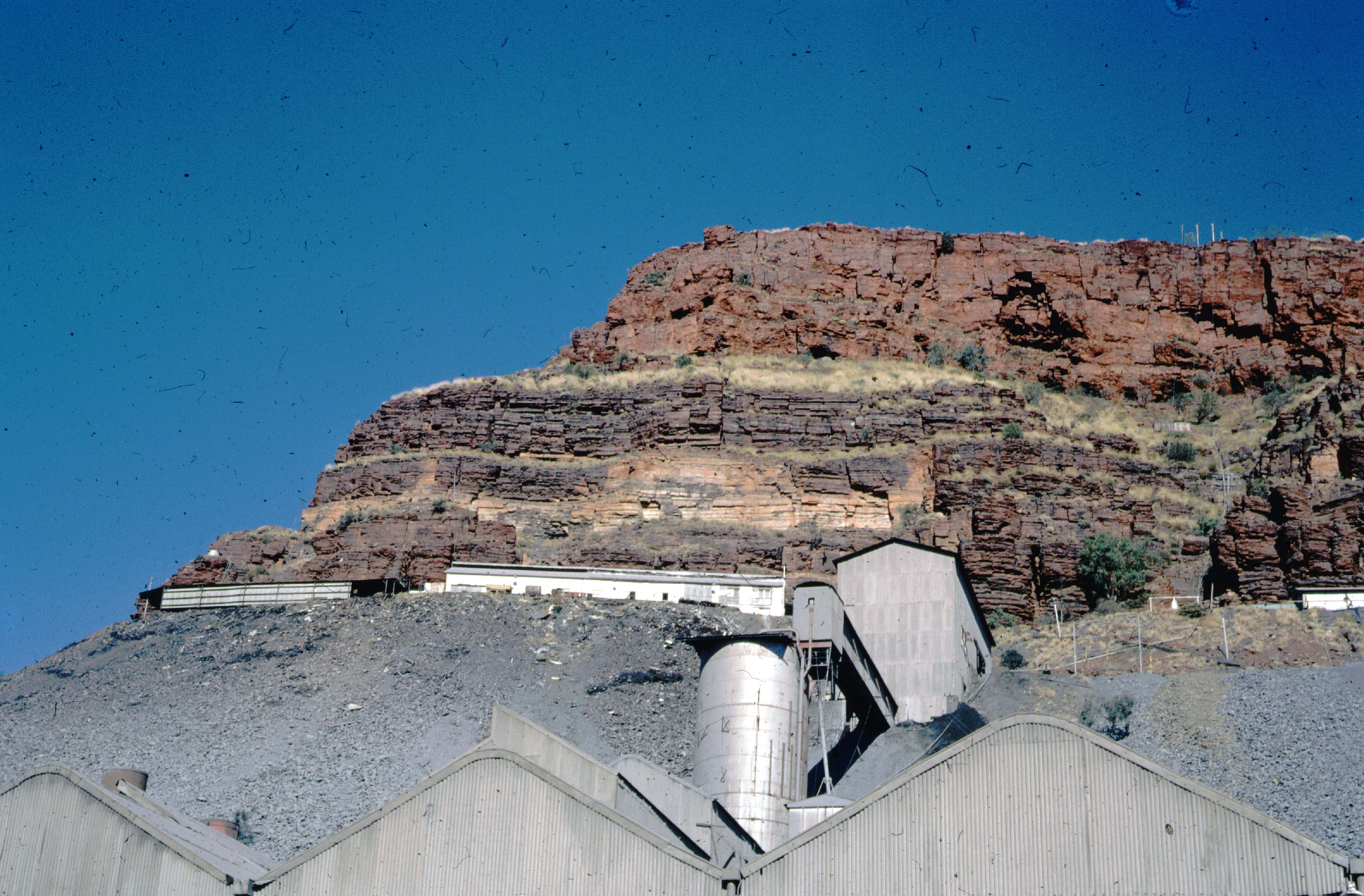 Blue Asbestos Mine, Wittenoom, Western Australia